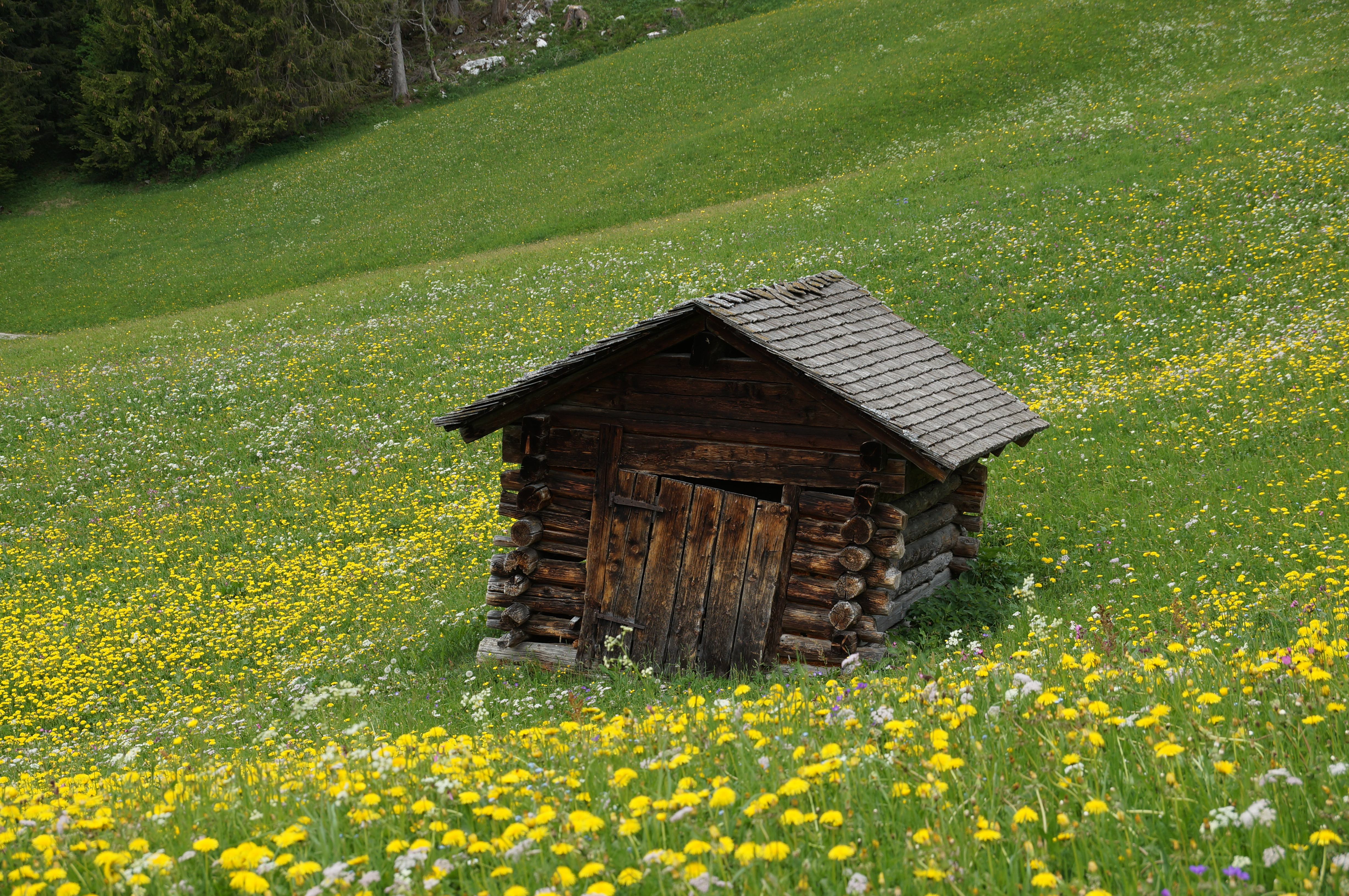 Alter Stall in Silum, Liechtenstein